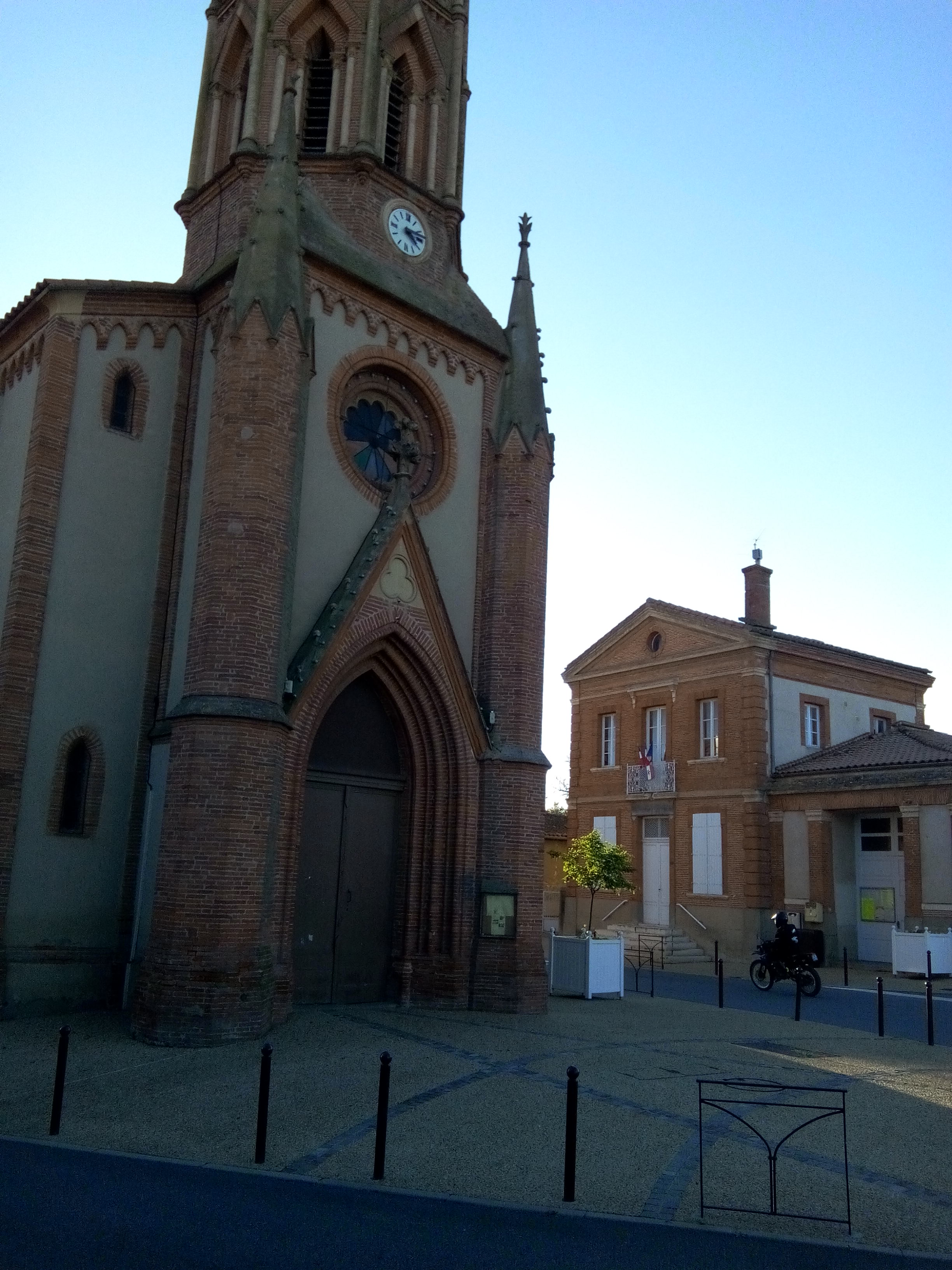 Ox église et ancienne maire